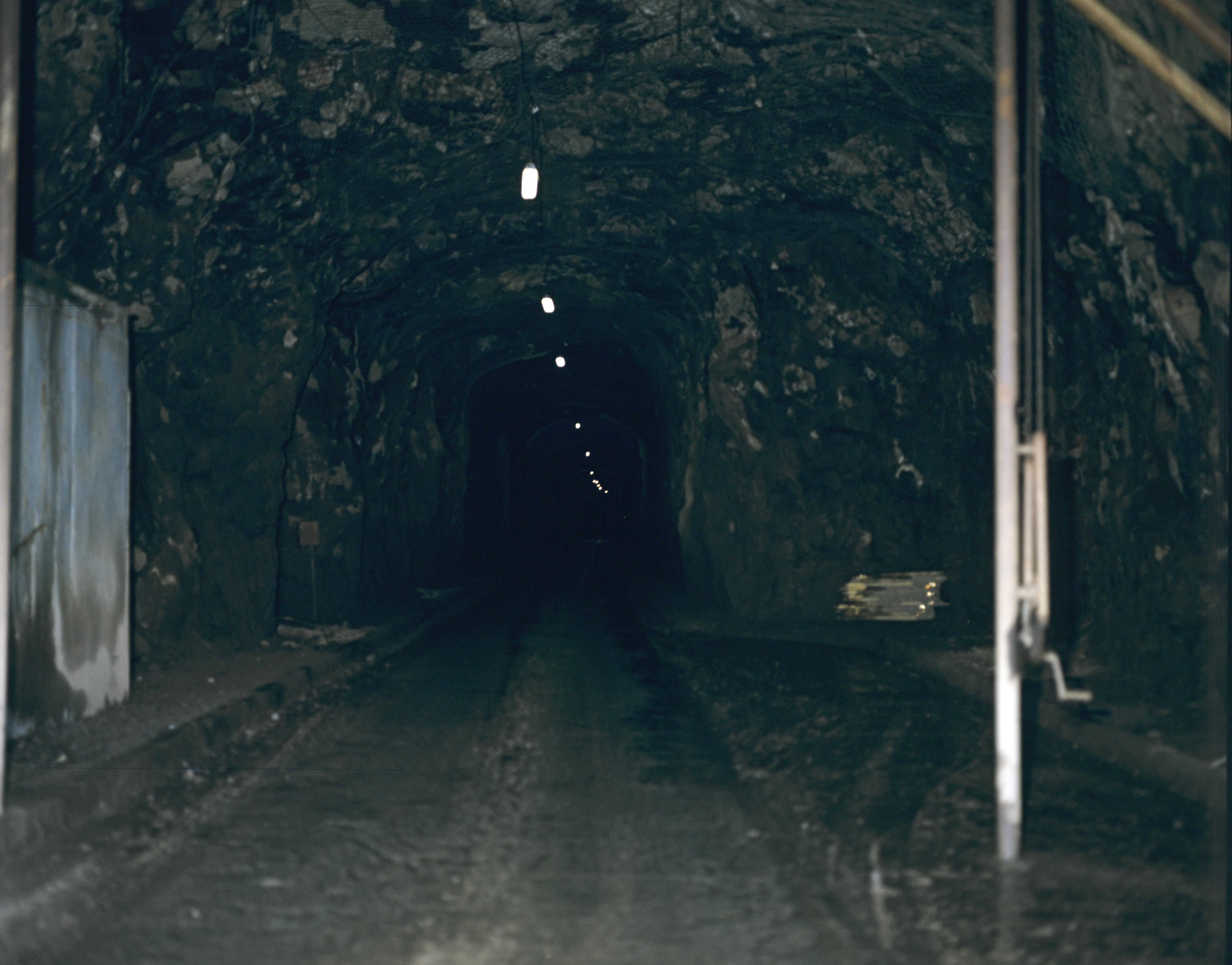 Tunnel „Strákar_jarðgöng“ auf der Straße nach Siglufjörður durch den Berg „Strákar“.